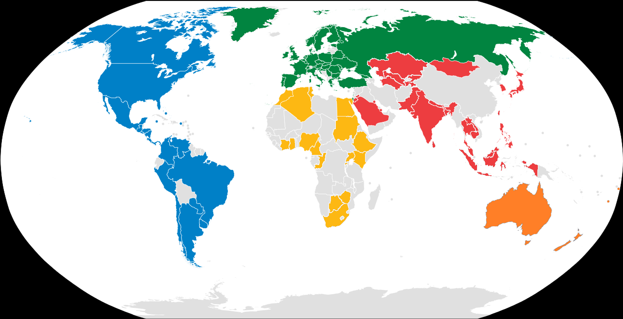 Mapa de naciones pertenecientes a la IFAF